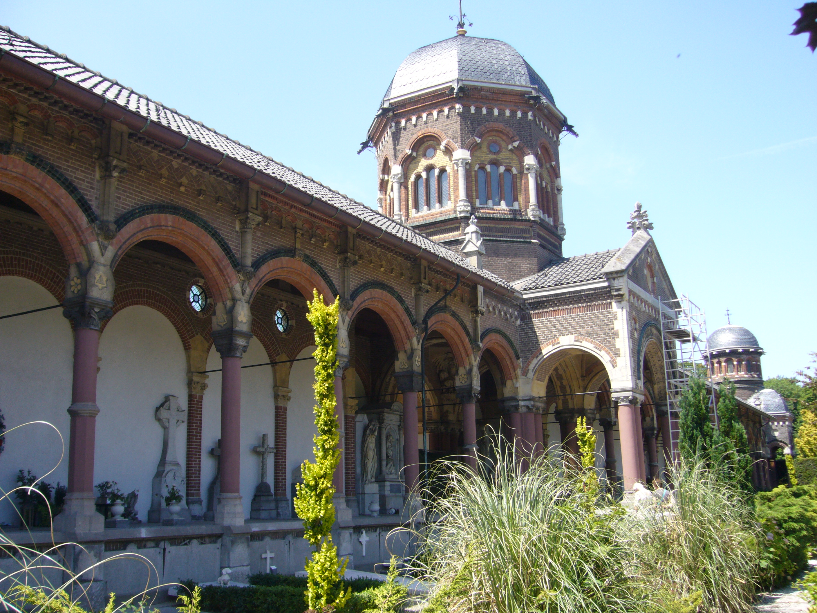 Deel van de arcade op de begraafplaats ST Petrus Banden in Den Haag